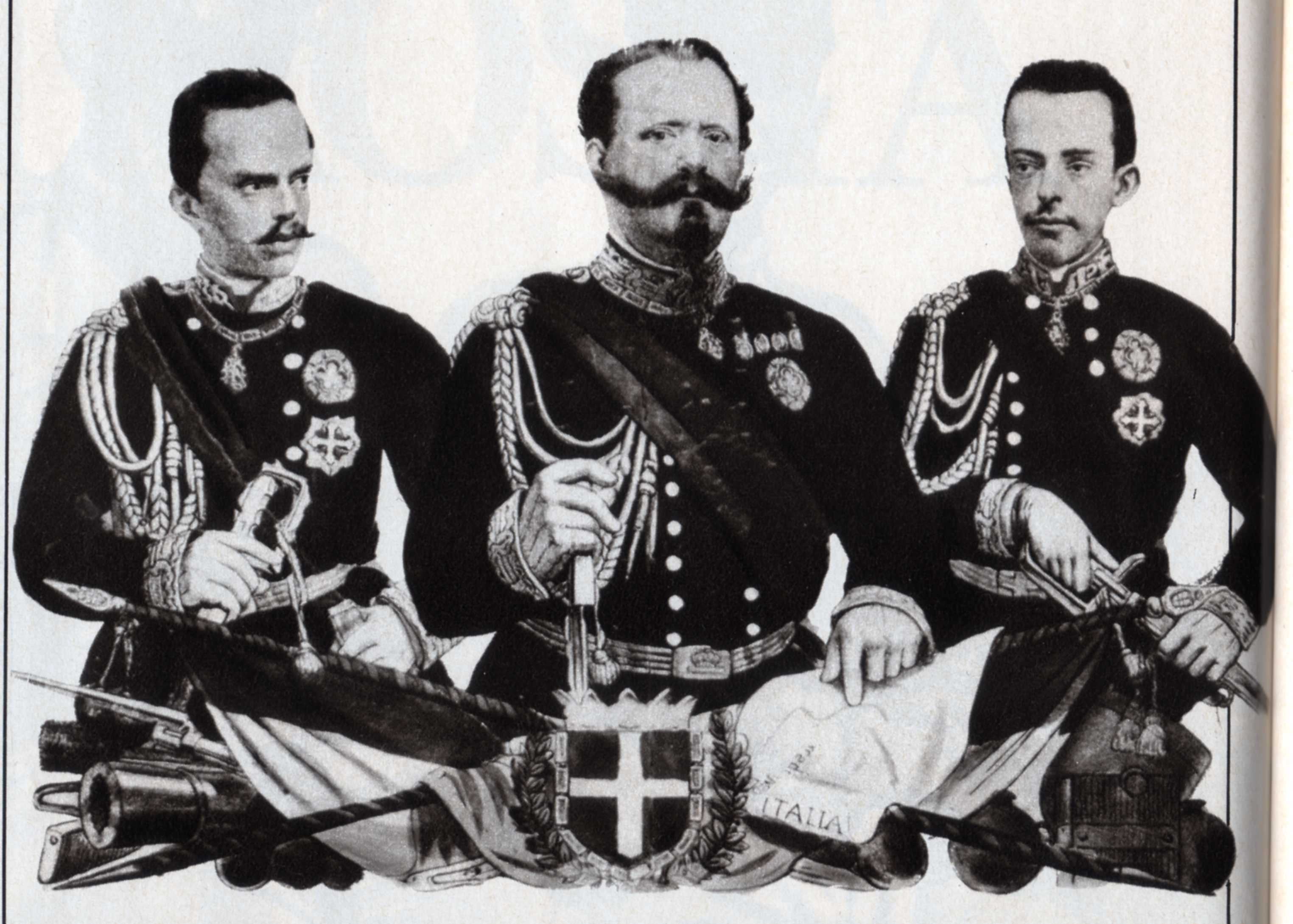 Vittorio Emanuele II, primo re d'Italia, con alla destra il primogenito, il futuro Umberto I e, alla sinistra, il terzogenito Amedeo, primo duca d'Aosta e capostipite della casata, nonché futuro re di Spagna